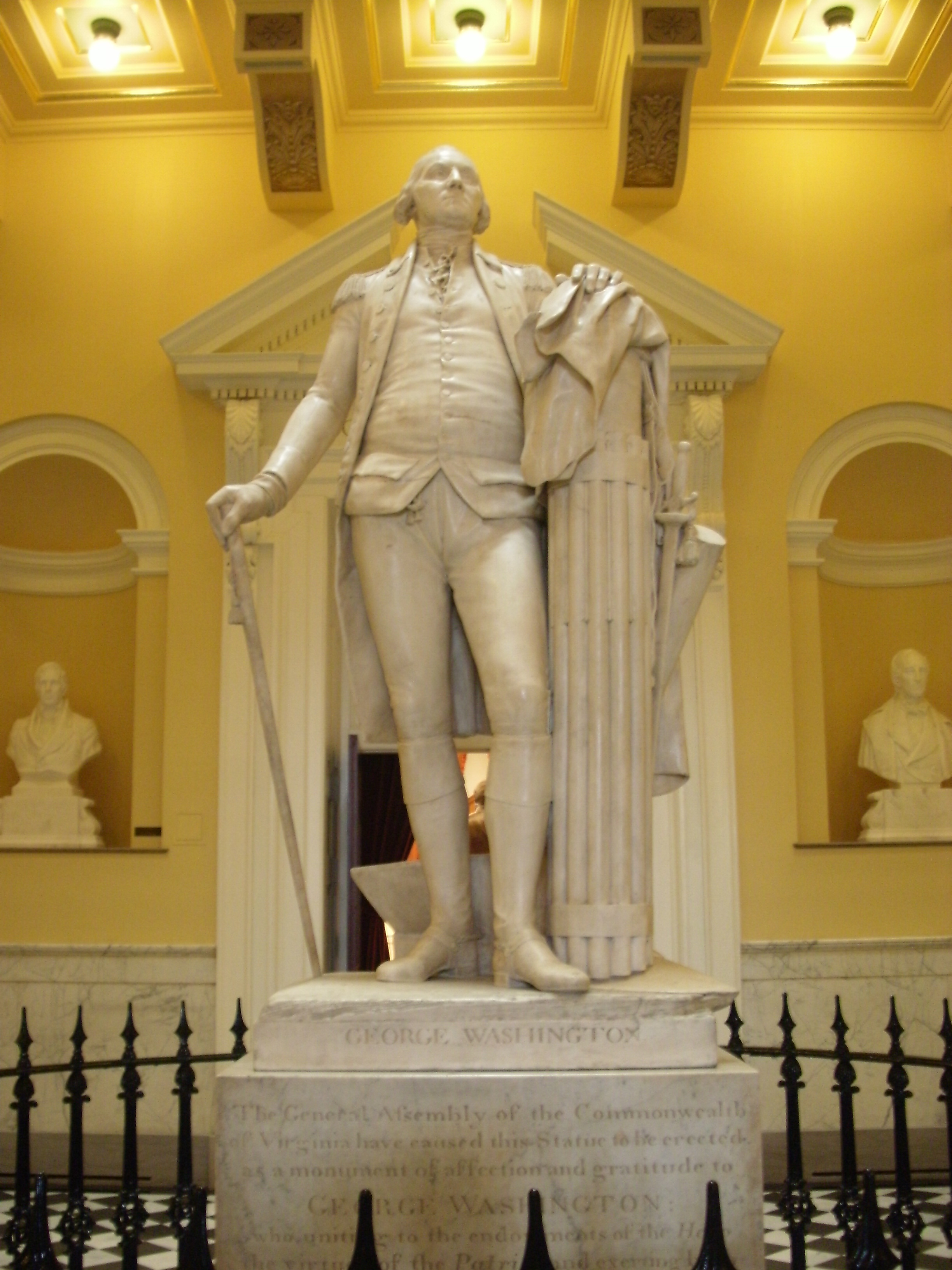 Virginia State Capitol, Richmond, VA GEDSC DIGITAL CAMERA